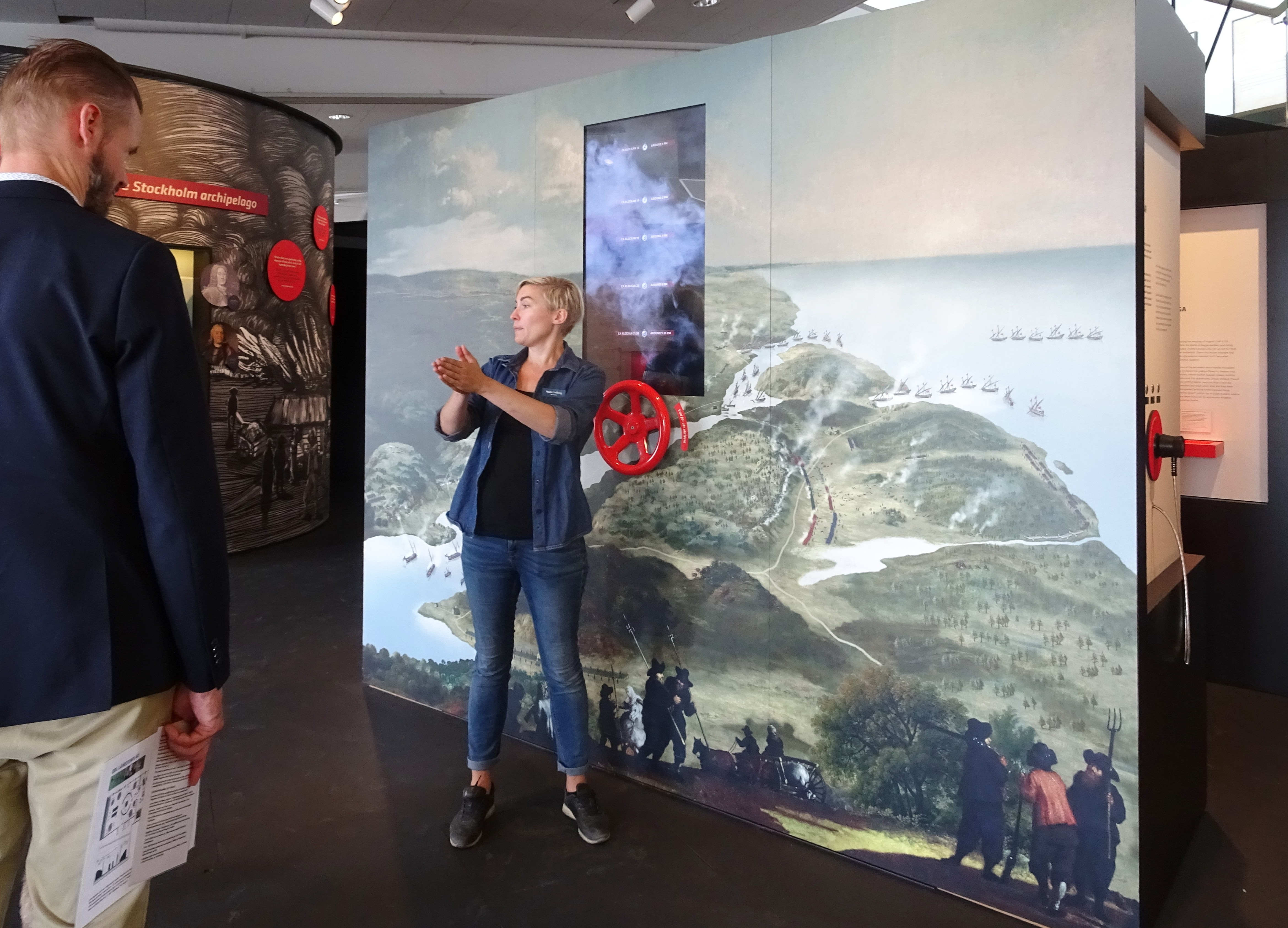 Historiearvsmuseet i Fisksätra